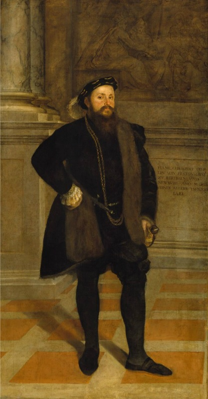 Person: Hans Christoph Vöhlin von Frickenhausen, Freiherr zu Illertissen und Neuburg an der Kammel, * 1521, † 14.7.1576 Maler: Lambert Sustris, * zwischen 1515 und 1520 in Amsterdam, † nach 1591 wohl in Venedig